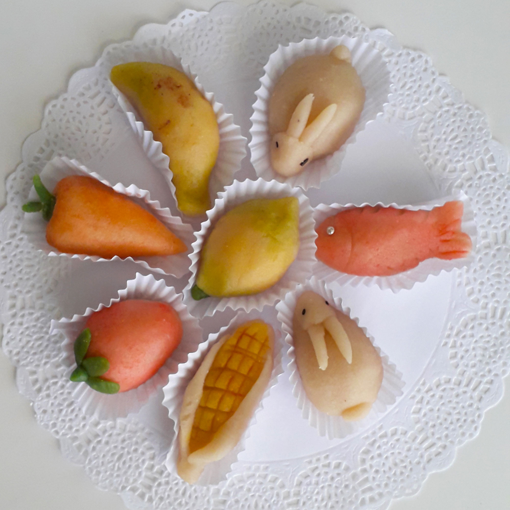 Doces finos